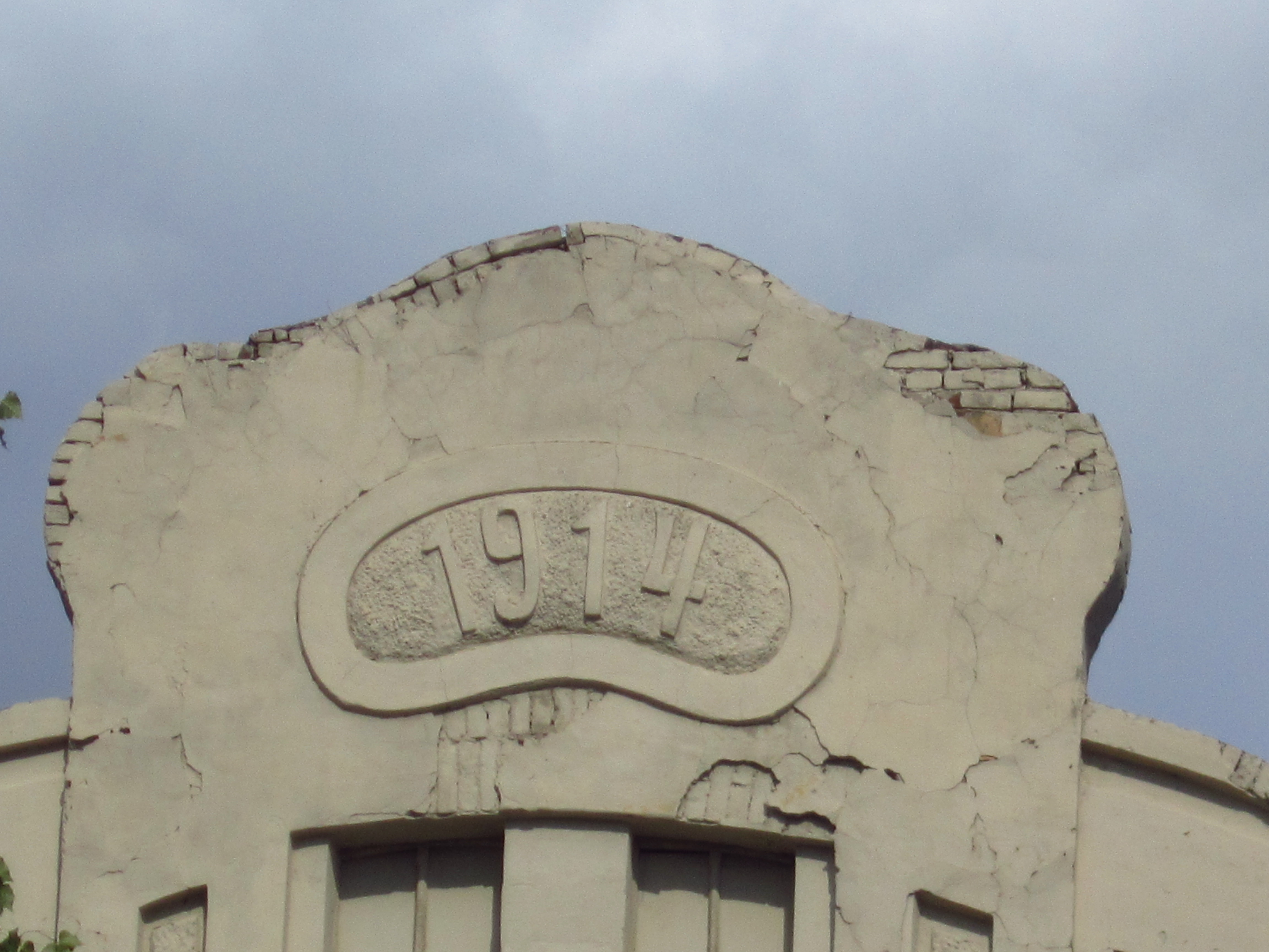 Корпуси кондитерської фабрики, Дніпропетровськ, Карла Лібкнехта вул., 4